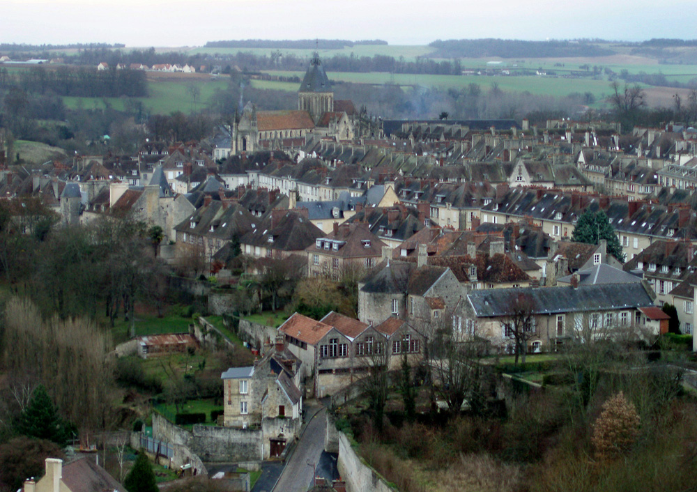 Vue générale de falaise (Calvados, Normandie, région basse-Normandie)